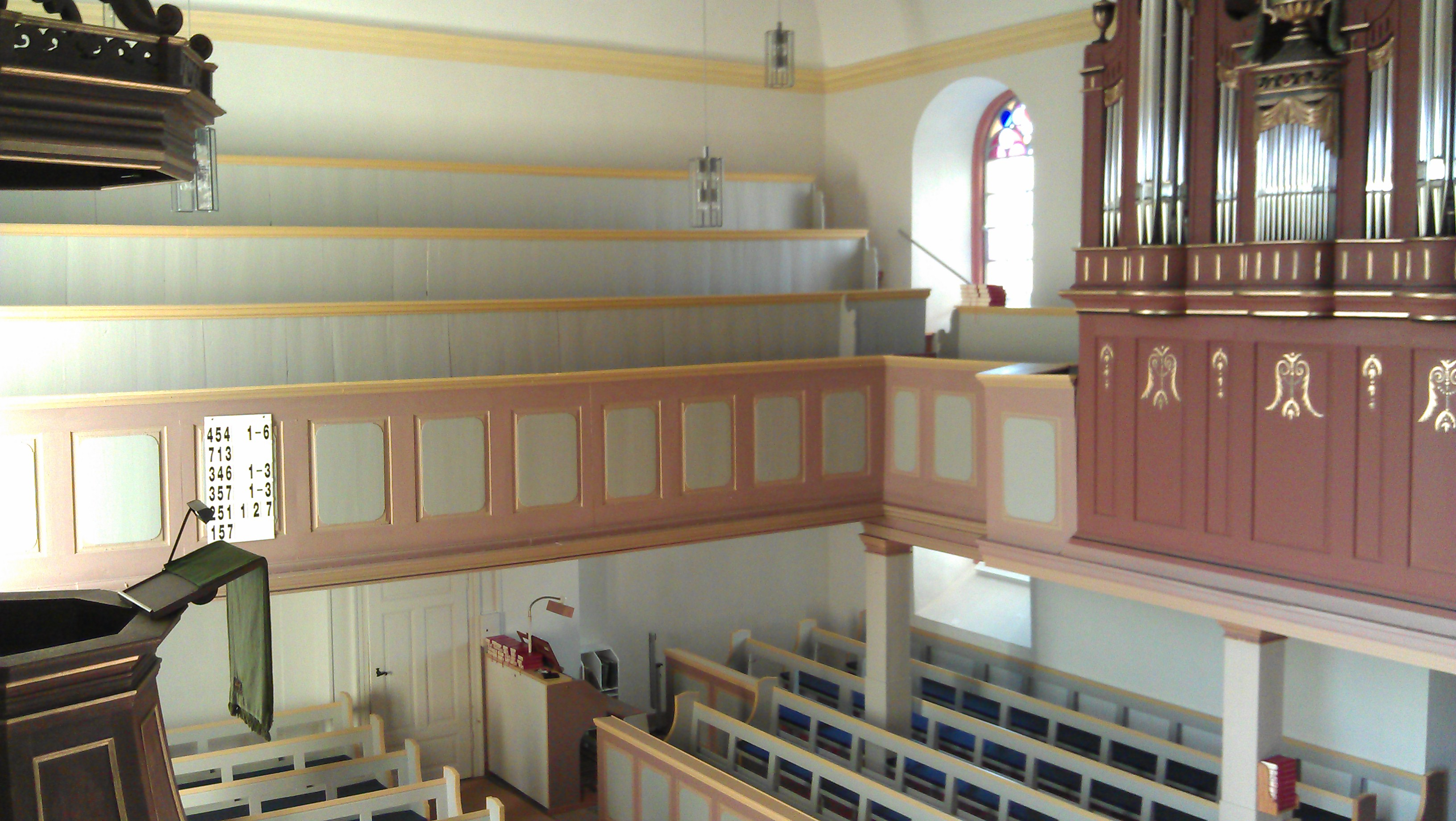 Orgel und Kanzel der Evangelischen Kirche Rupppertsburg, Laubach, Landkreis Gießen, Hessen, Deutschland